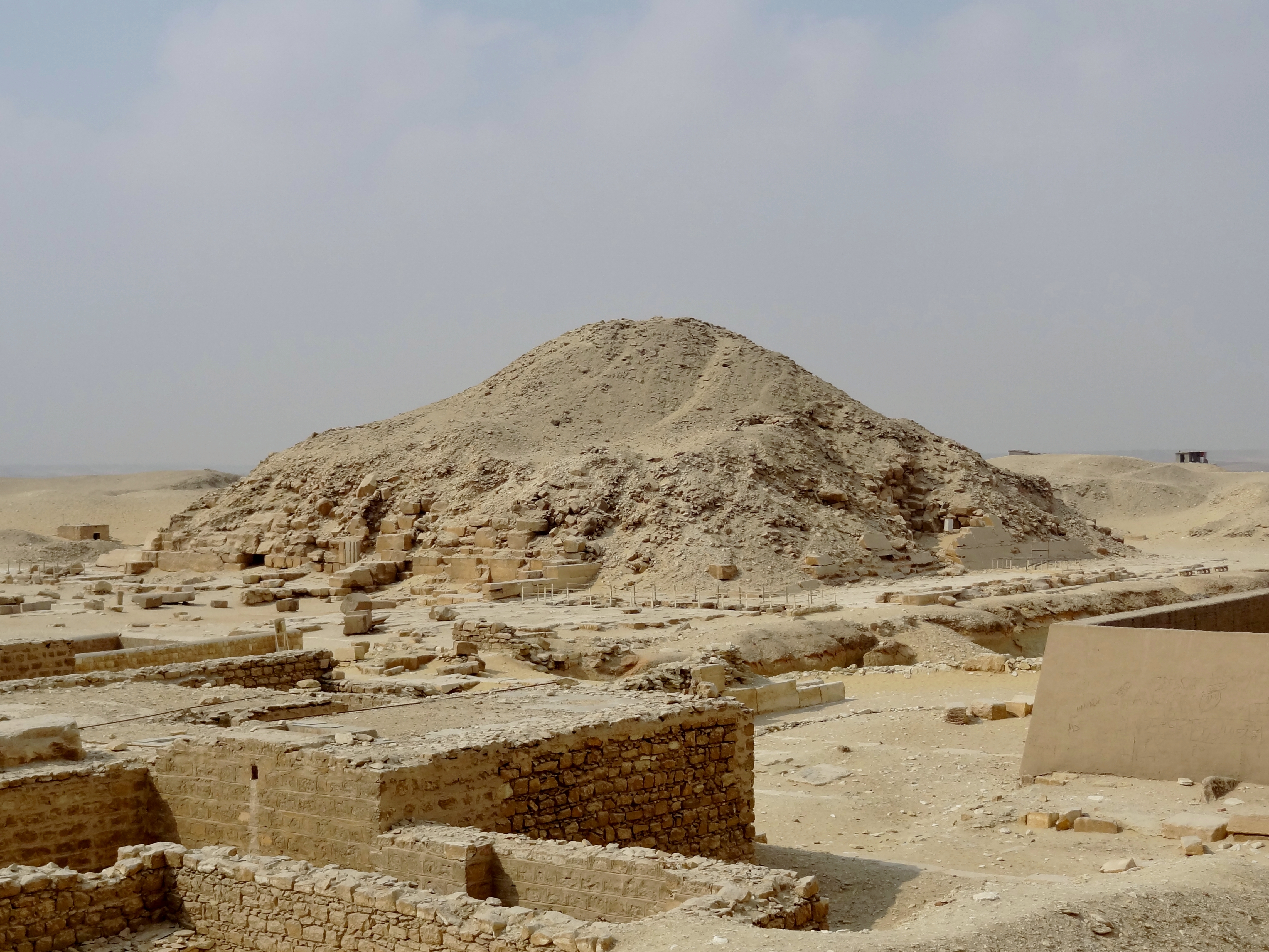 Pyramide des Unas in Sakkara, Ägypten